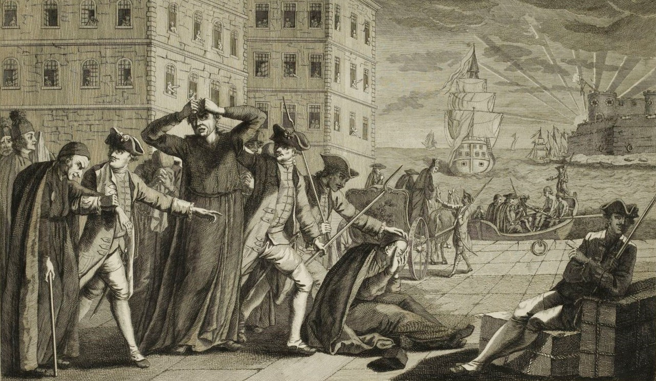 Expulsion des jésuites d'Espagne par ordre de sa Majesté catholique (31 mars 1767). Musée de la Révolution française - Vizille.